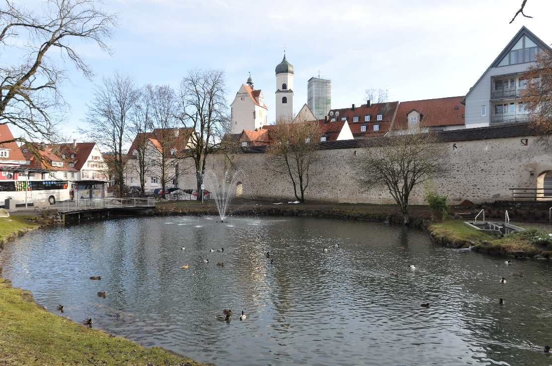 Ein Spaziergang durch Isny im Allgäu im Dez 2012